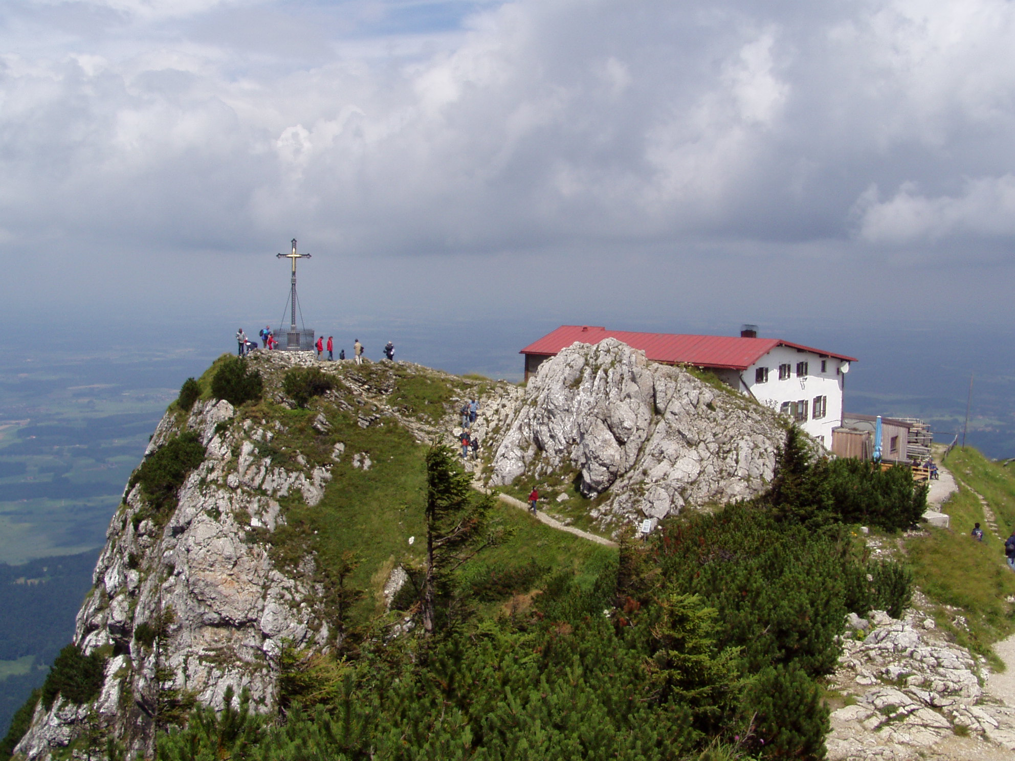 Gipfelkreuz des Hochfelln in den Chiemgauer Alpen